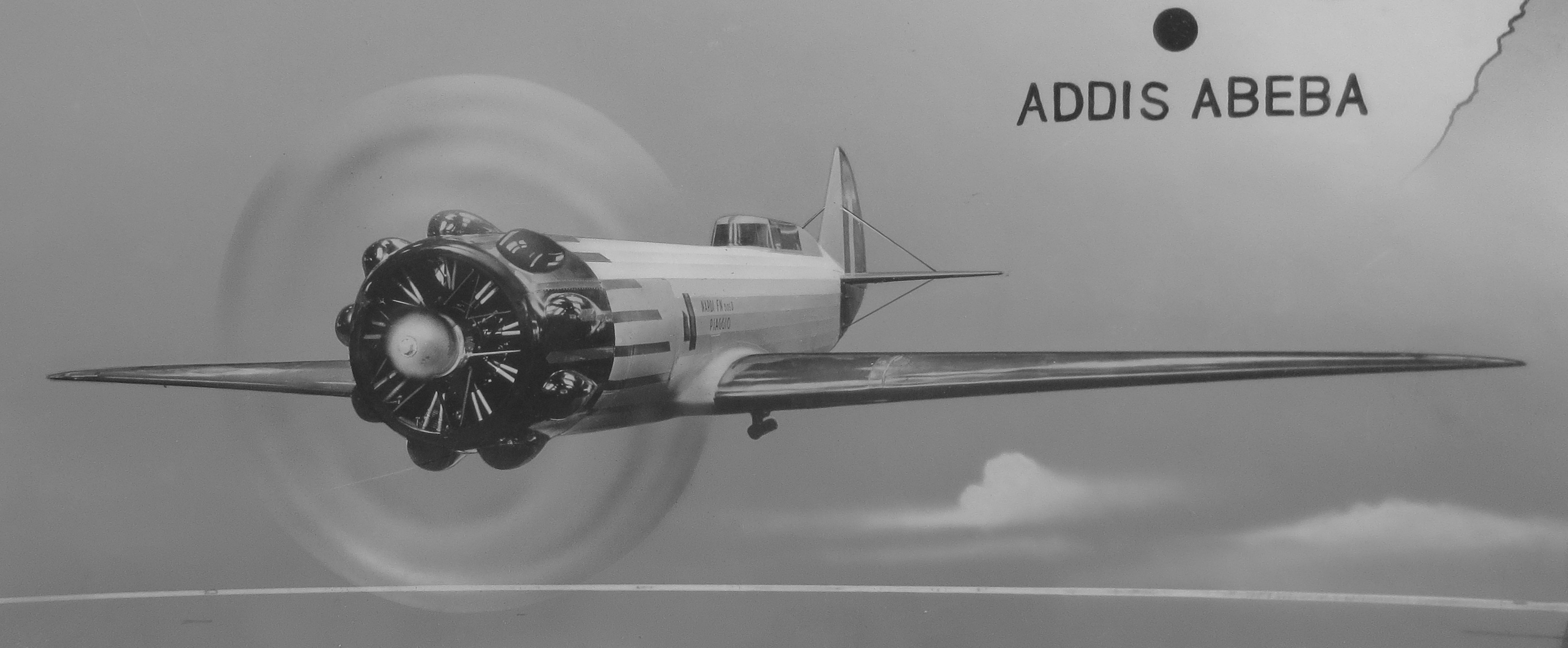 letecký motor Walter Bora a letoun Nardi FN.305D